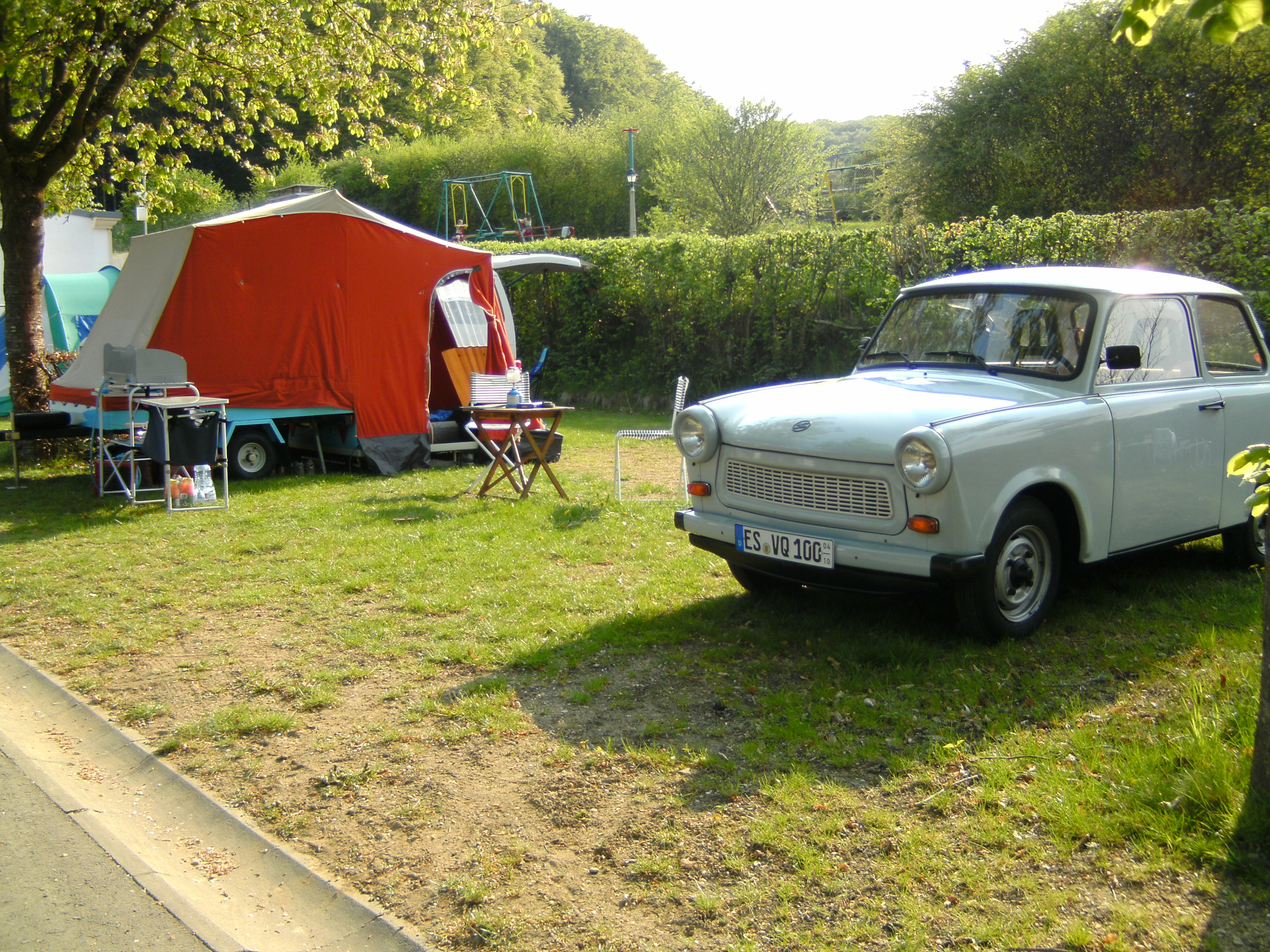 Rhön Universal, Baujahr 1990, mit passendem Zugfahrzeug Trabant 601, Baujahr 1988, auf einem Campingplatz in Luxemburg.